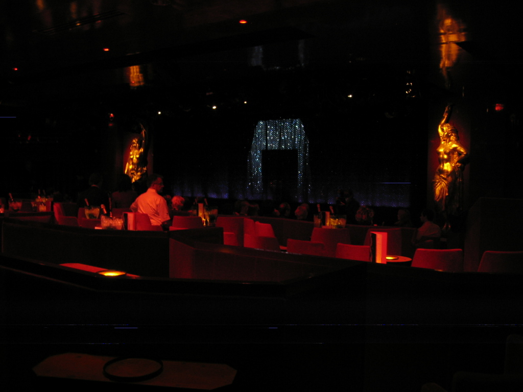 Cabaret du Crazy Horse Saloon, Paris, France